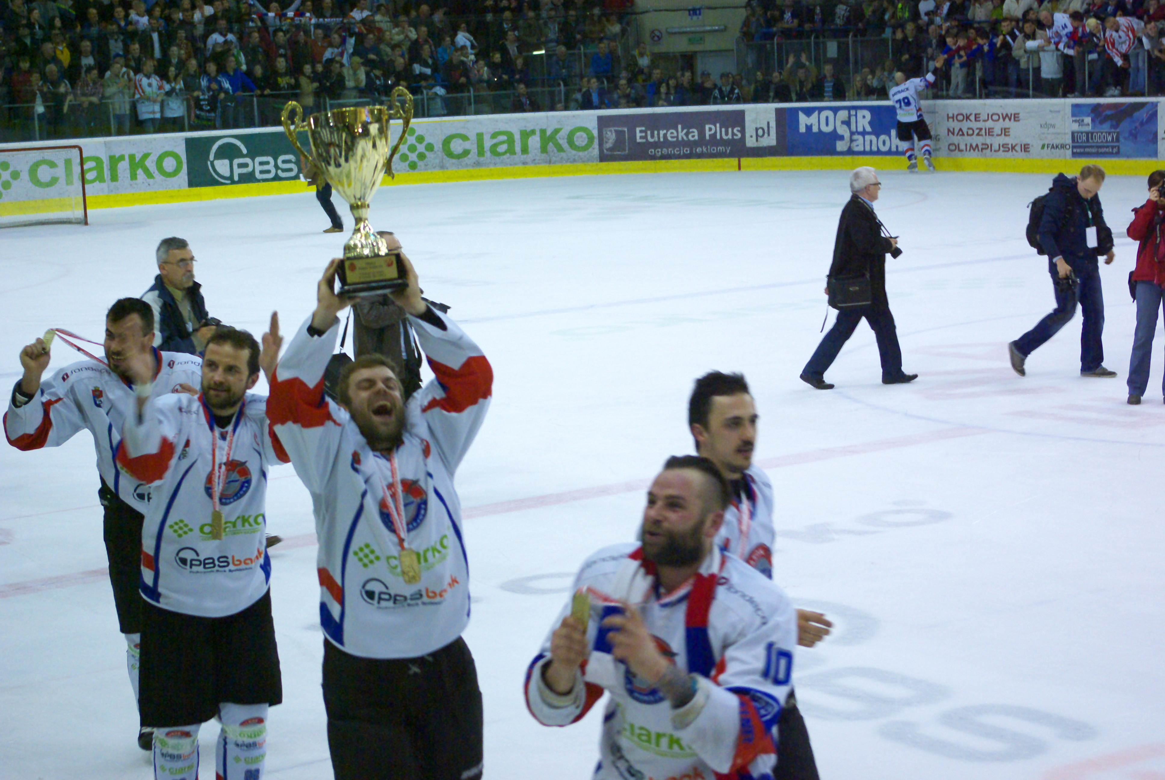 Szósty mecz finałowy o mistrzostwo Polski w hokeju na lodzie w sezonie PHL 2013/2014: Ciarko PBS Bank KH Sanok – GKS Tychy (2:0), 3 kwietnia 2014 w Sanoku (Arena Sanok). Złoty medal dla zespołu z Sanoka.